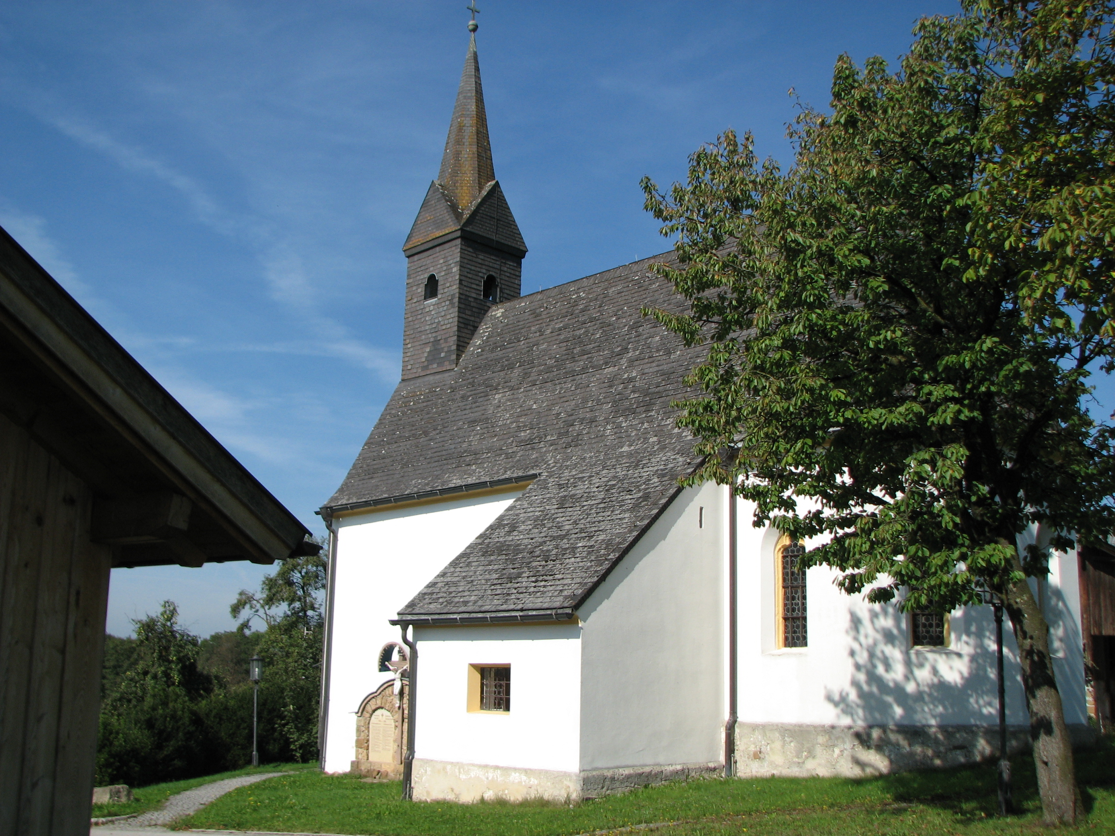 Kath. Filialkirche hl. Maximilian